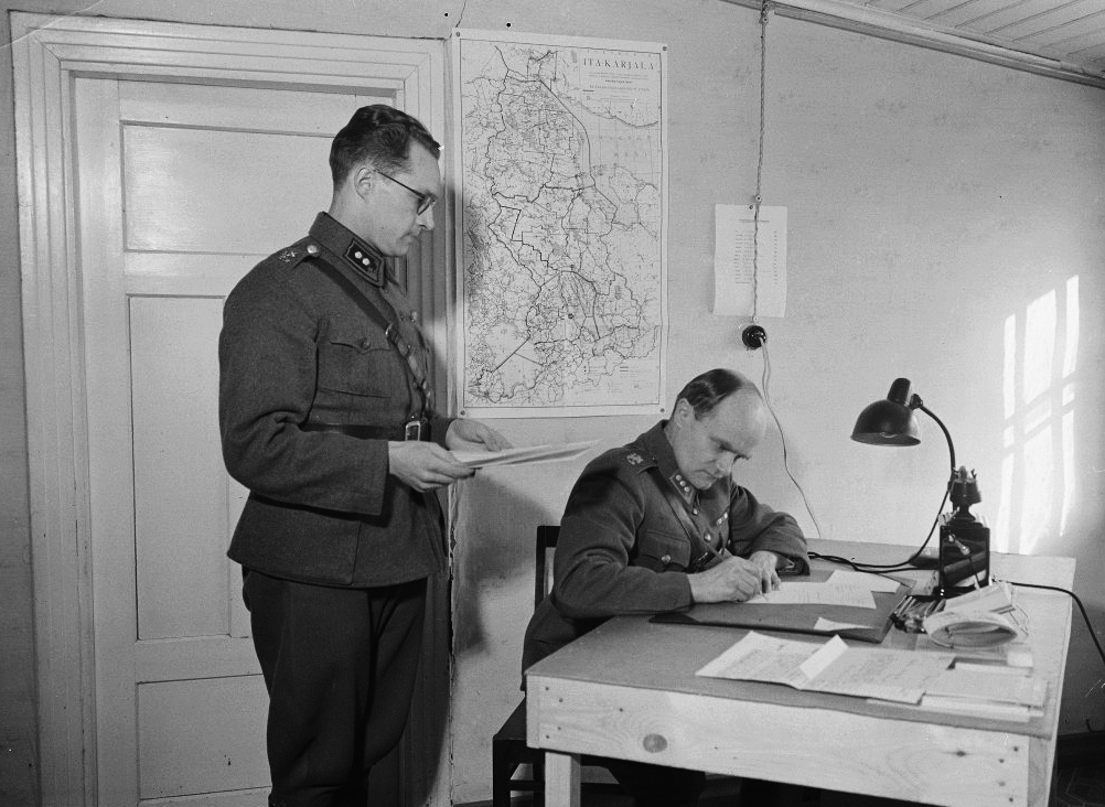 Luutnantti Jouni Osmo Antero Pelttari, kapteeni Paavo Kekomäki.